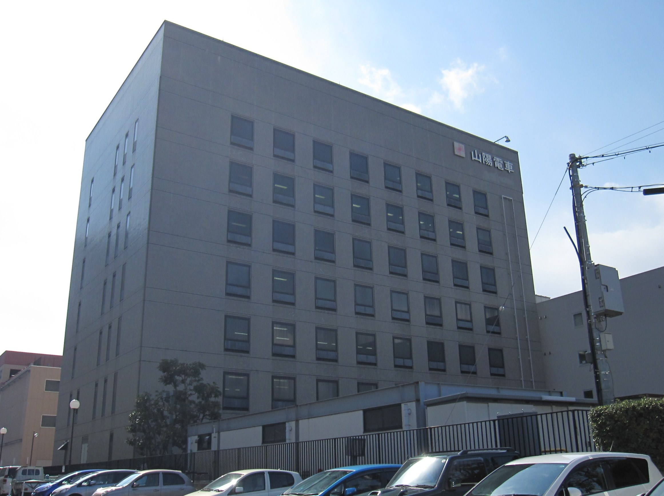 西代にある山陽電気鉄道本社ビル